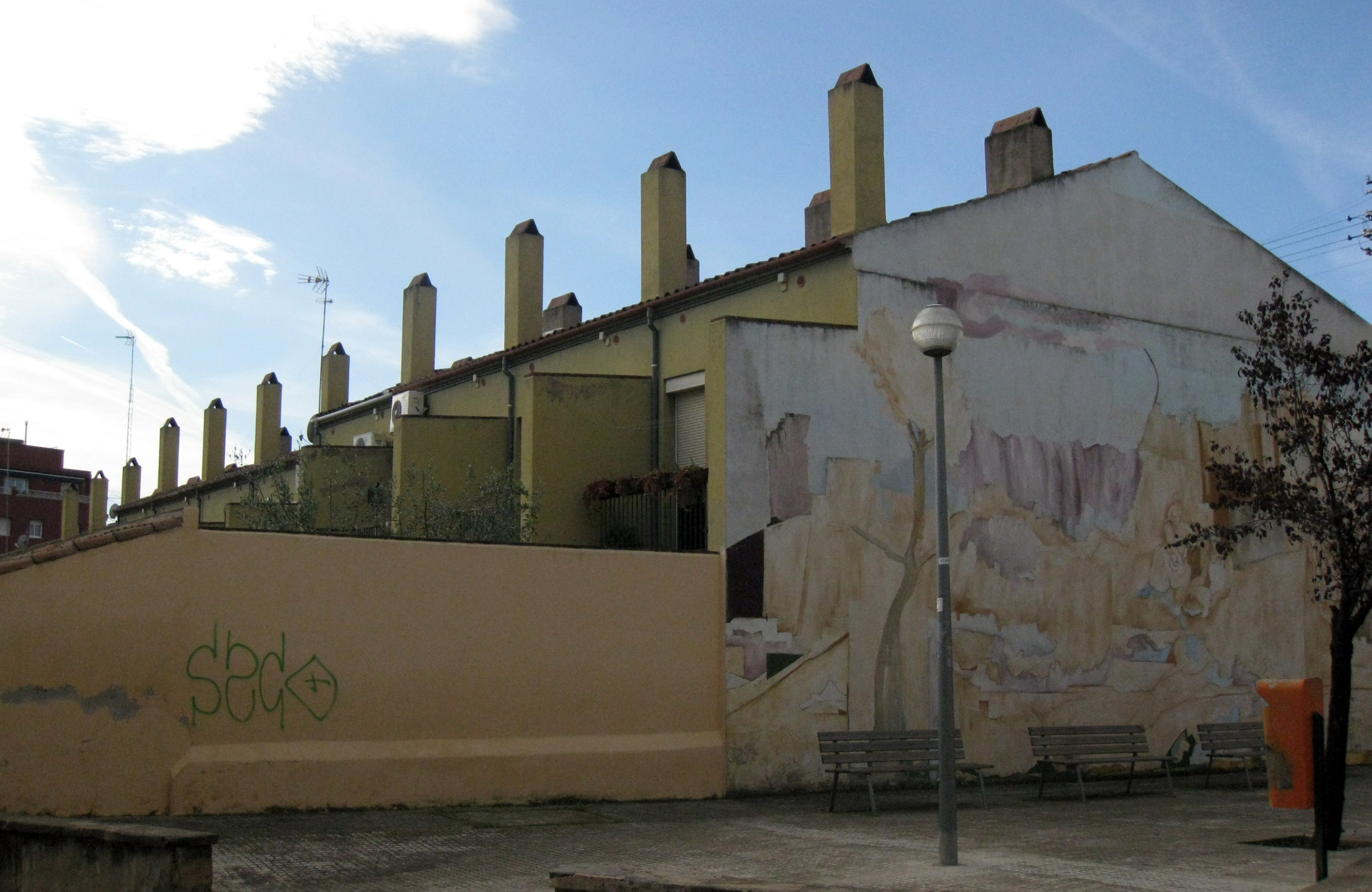 Conjunt de cases unifamiliars a la carretera de Rubí, 171-191 (Terrassa). Vista del conjunt des del carrer Navas de Tolosa, on se'n pot contemplar la part posterior, amb el pati.